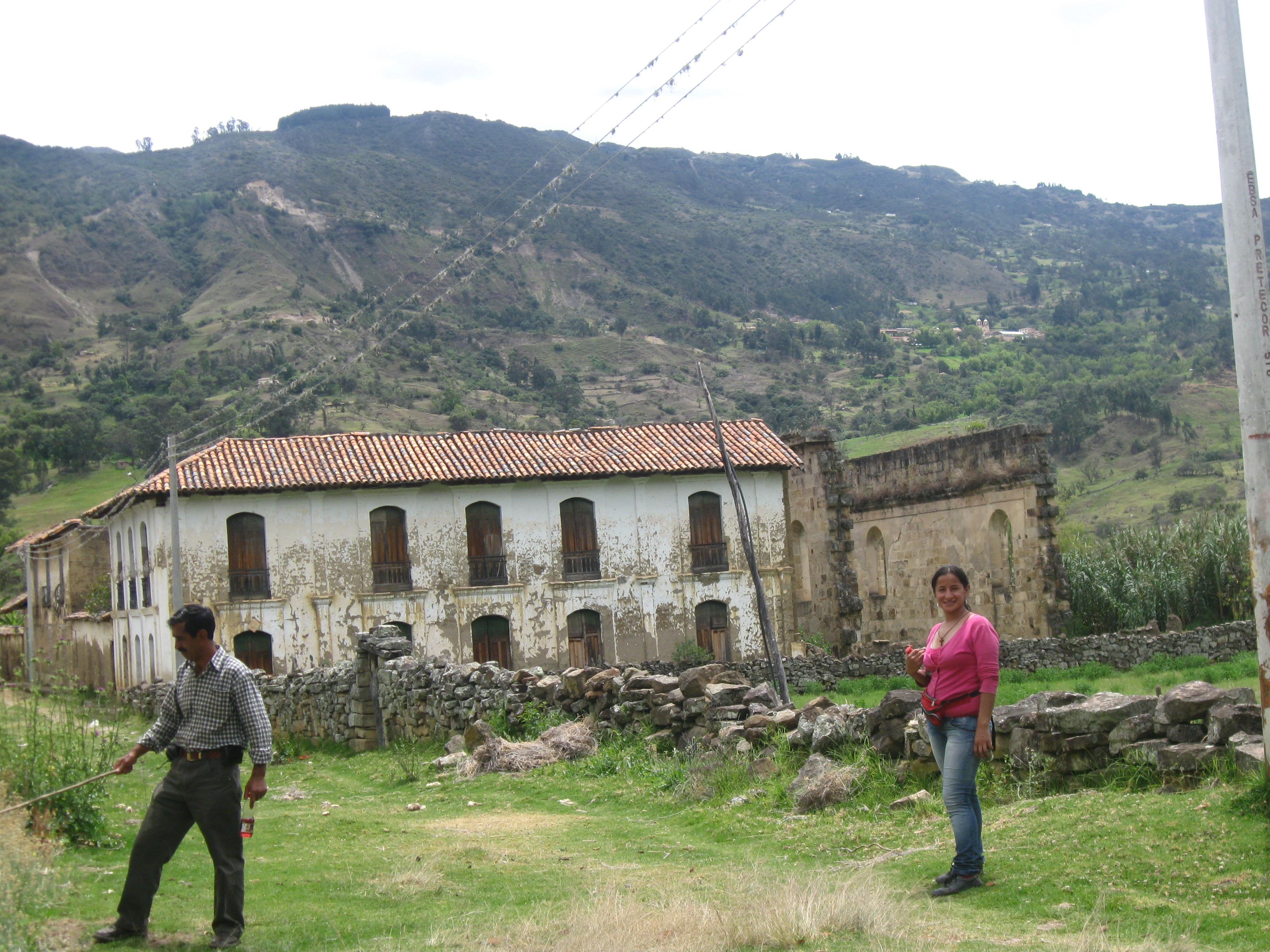 Se observa las ruinas de Sativaviejo. Una de las casa de la plaza central en buen estado aun, y la segunda iglesia levantada para reponer la destruida en Noviembre de 1933.